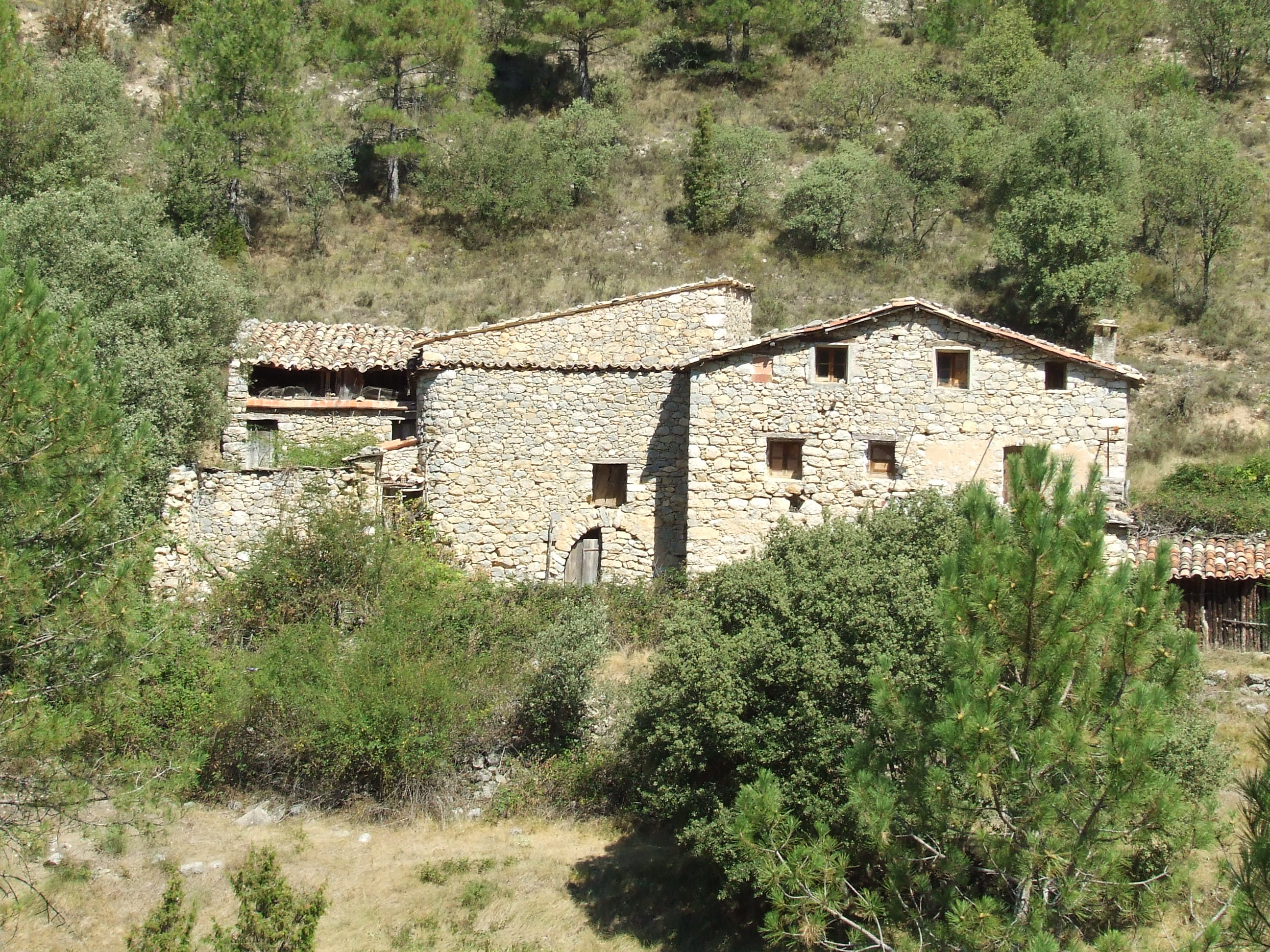 La Masia Gurdem (Abella de la Conca, Pallars Jussà)